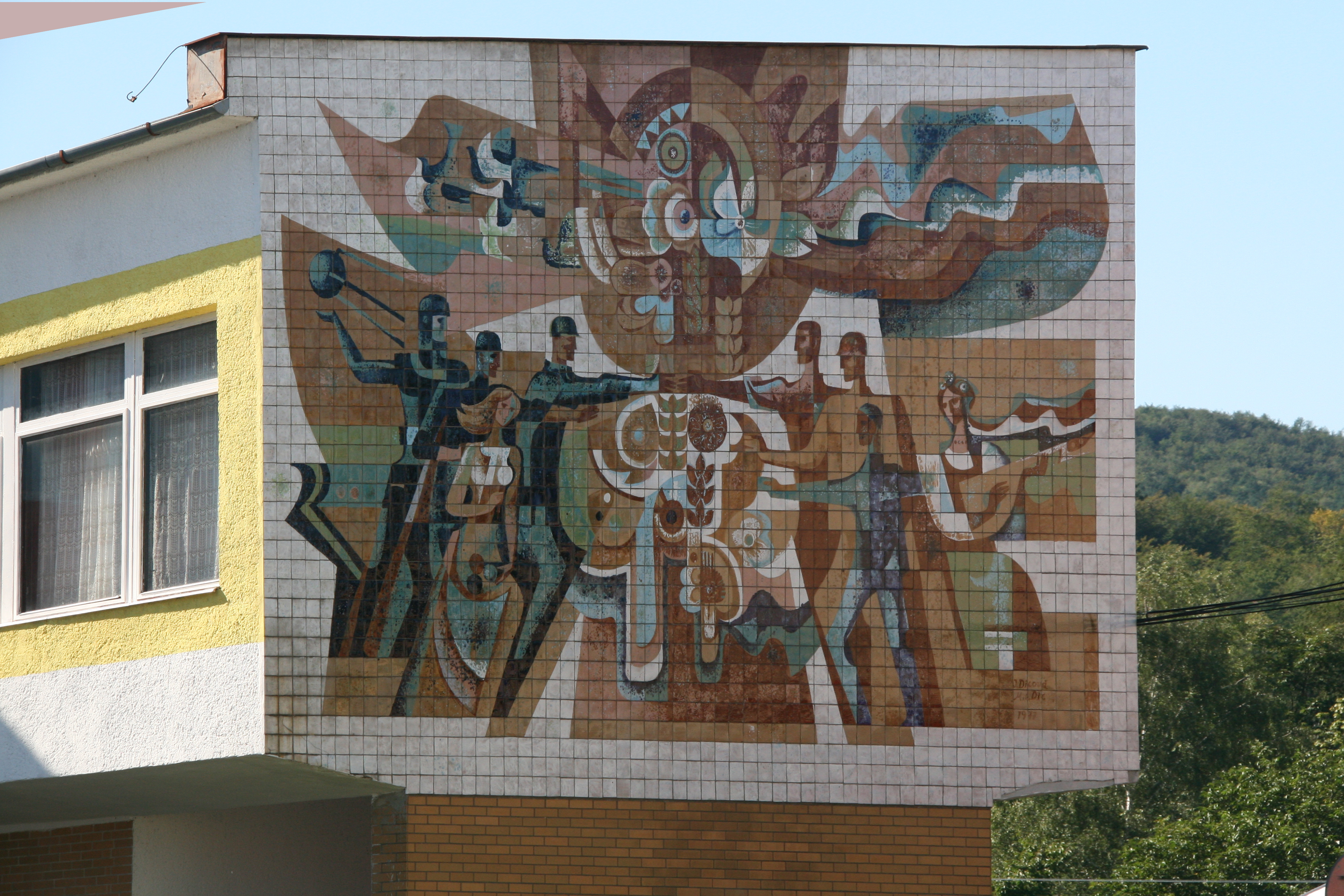 Keramická mozaika, 1977